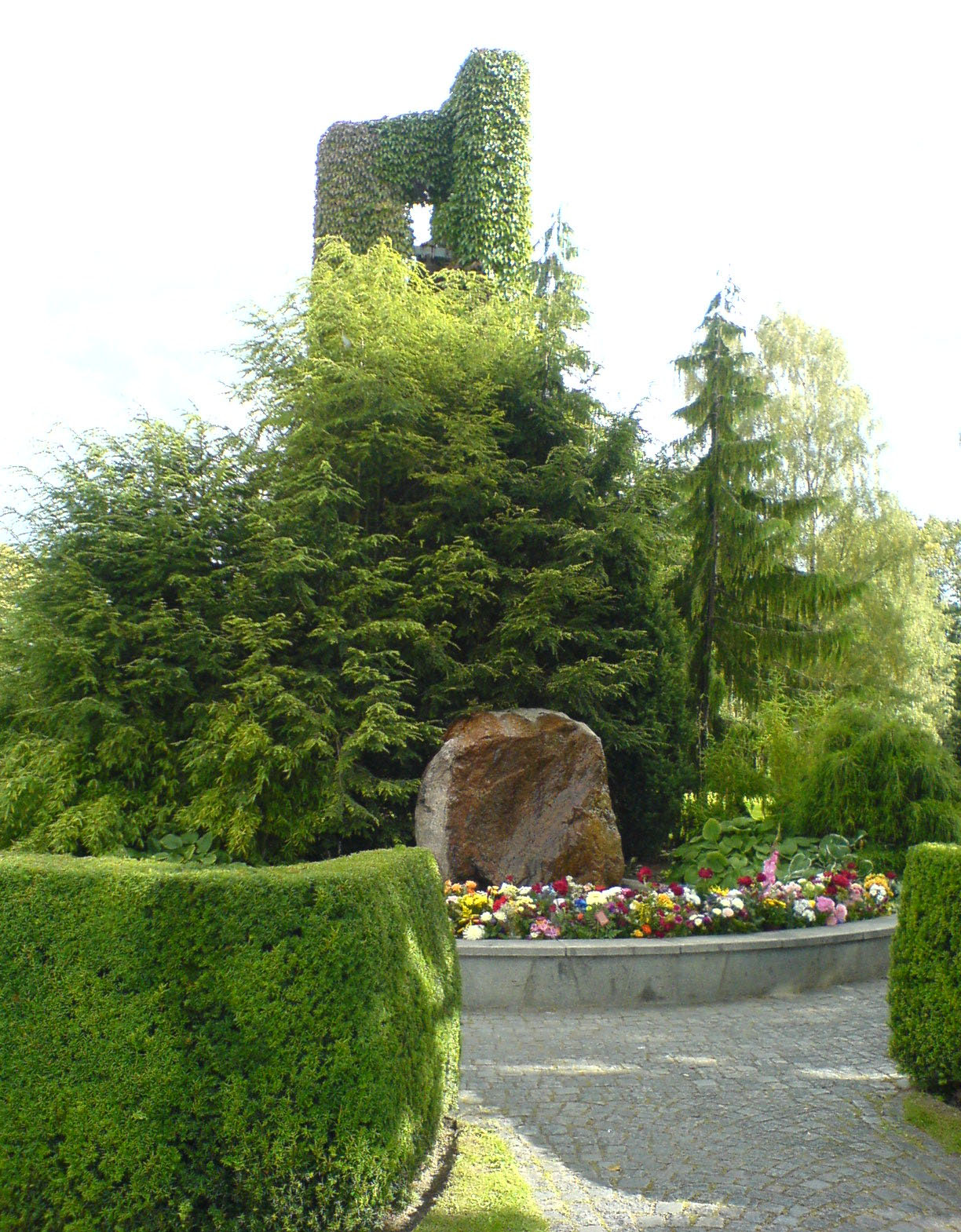 Norra kyrkogården i Norrköping, september 2007. Minneslunden med klockstapeln bakom.